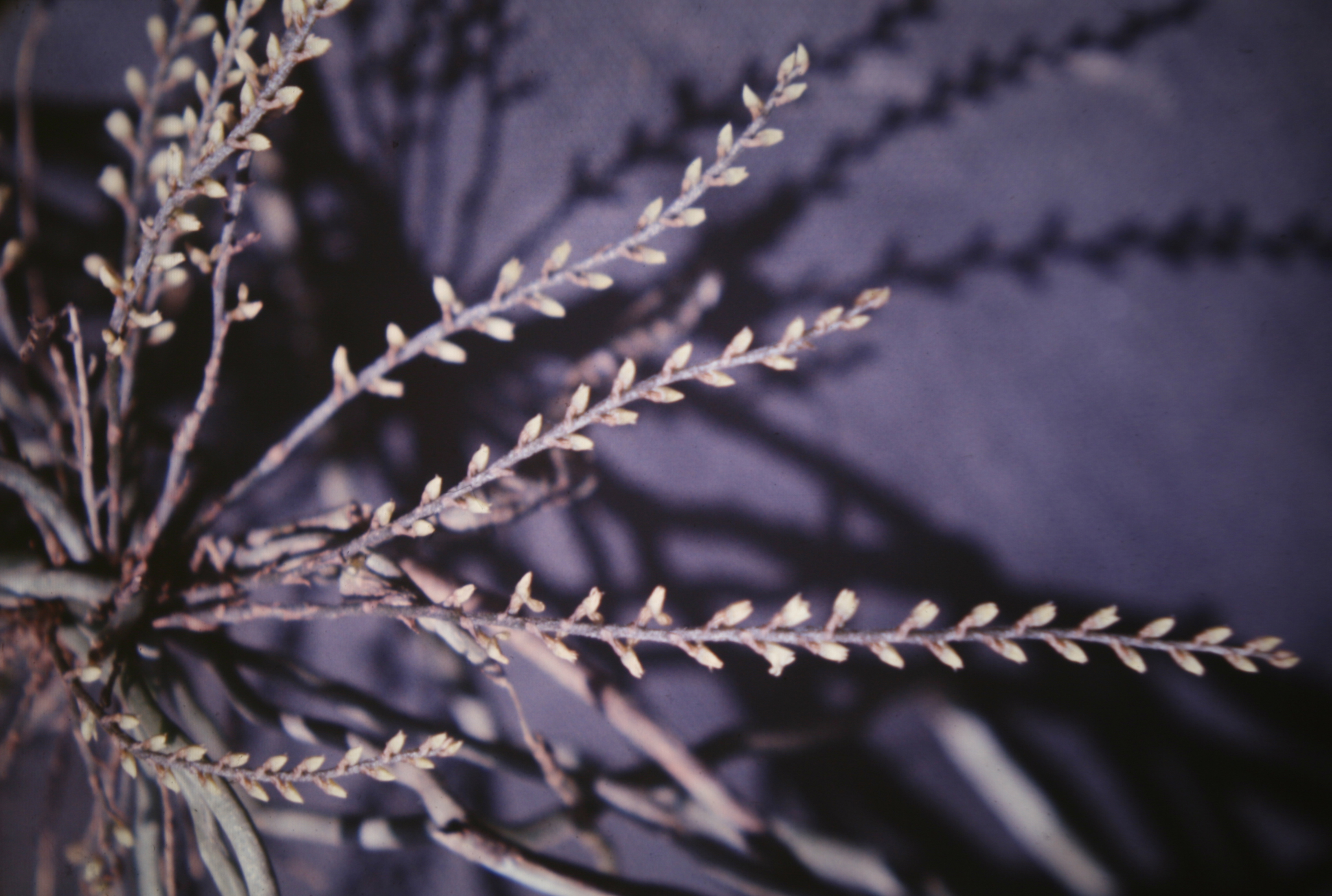 Campylocentrum fasciola, Suriname.